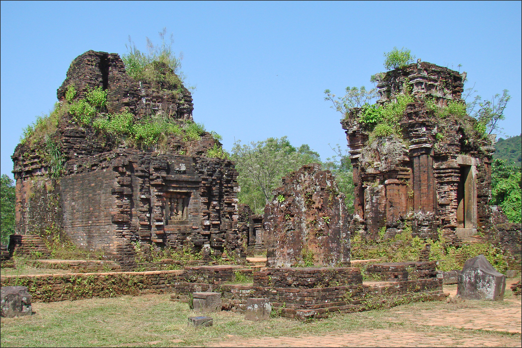 Le sanctuaire principal (kalan) - groupes B, C, D Le temple Cham ou Kalan est probablement une représentation symbolique de Sikhara, le sommet de la montagne sacrée des Cham, appelé mont Meru dans le brahmanisme. Le mont Meru est la montagne mythique considérée comme l'axe du monde dans la mythologie hindoue.